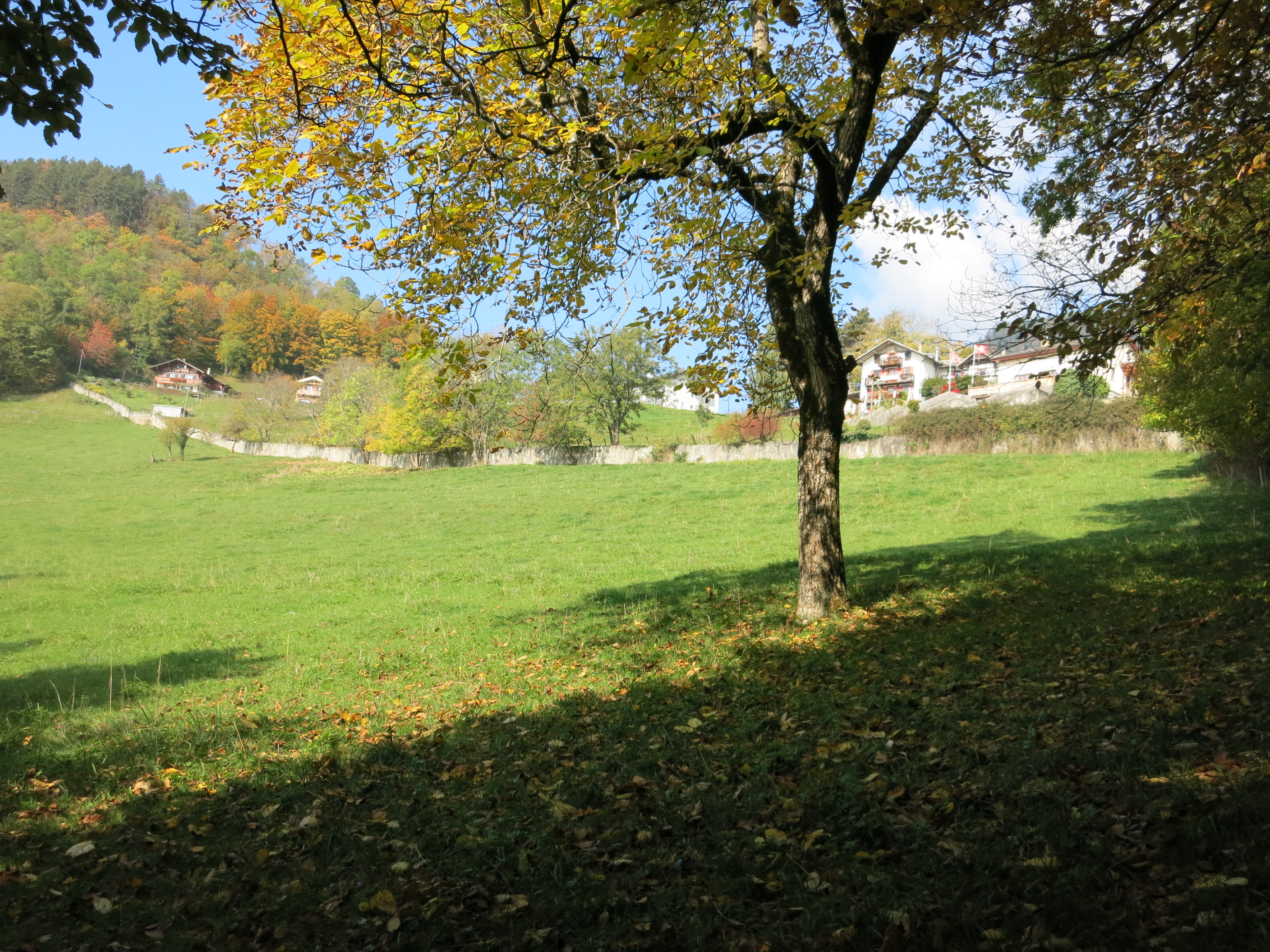 Sperrstelle Corbeyrier VD, Schweiz